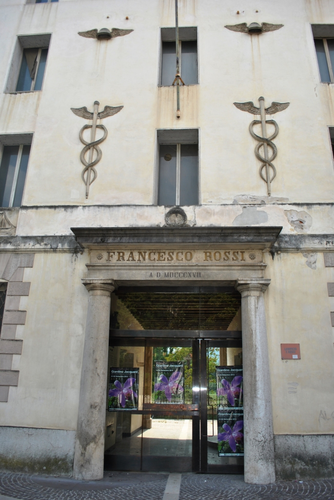 Edificio "Fabbrica Alta" - Area ex Lanerossi This is a photo of a monument which is part of cultural heritage of Italy.